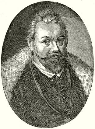 Báthory Kristóf erdélyi vajda